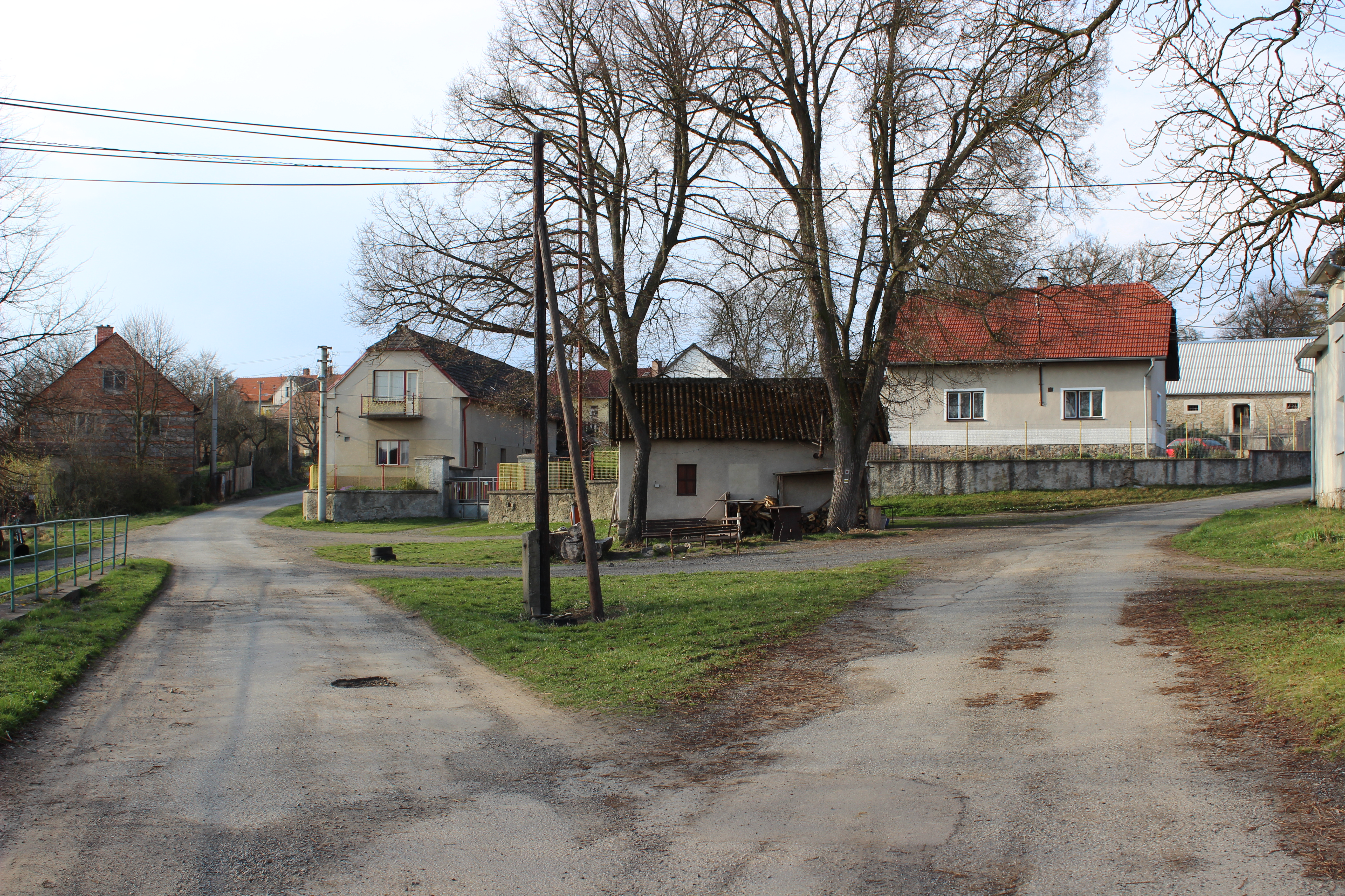 Náves v Blažimi, části Neveklova. This photograph was taken with a Canon EOS 600D.